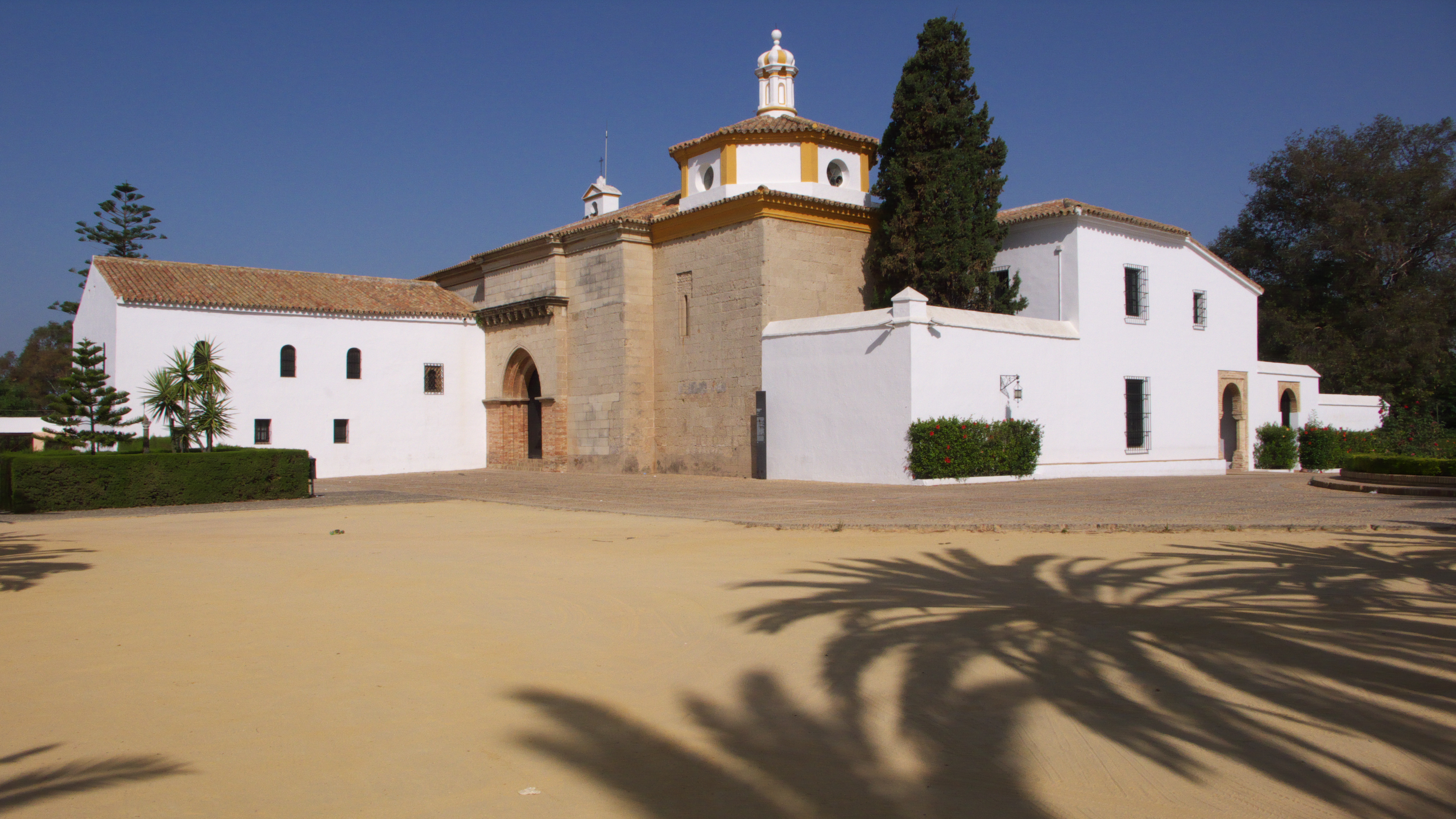 Siglos XIV-XV. Este antiguo ribat, ha sido siempre conservado por por la orden franciscana.